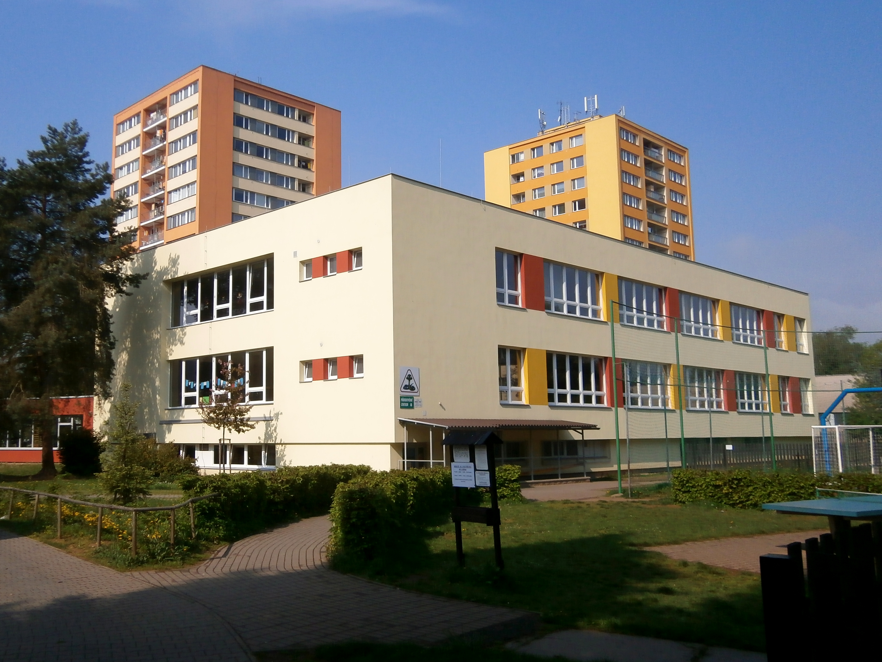 Základní škola Bezručova (Hradec Králové)